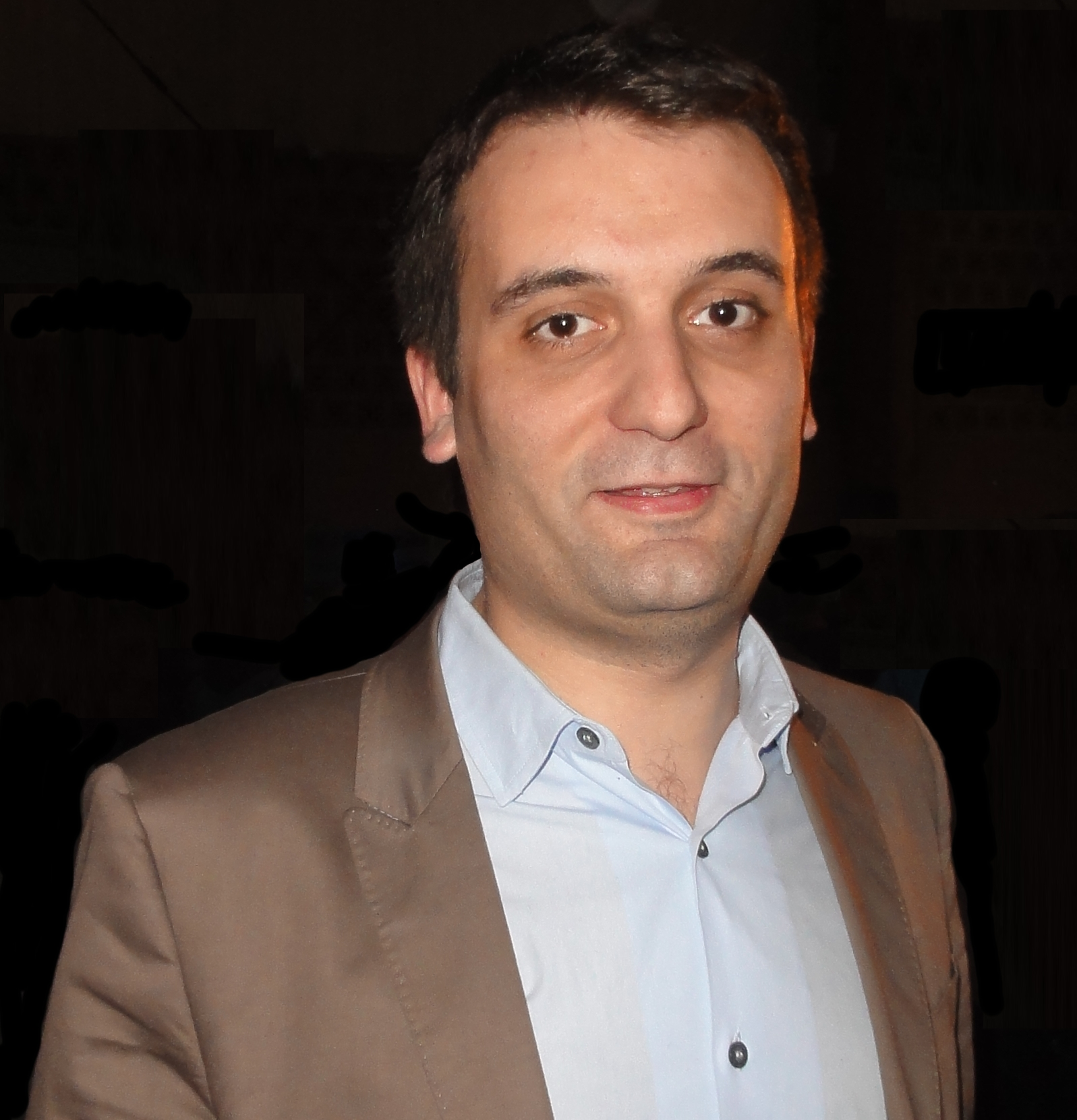 Florian Philippot à la réunion publique de Marine Le Pen le 15 avril 2012 à Hénin-Beaumont.